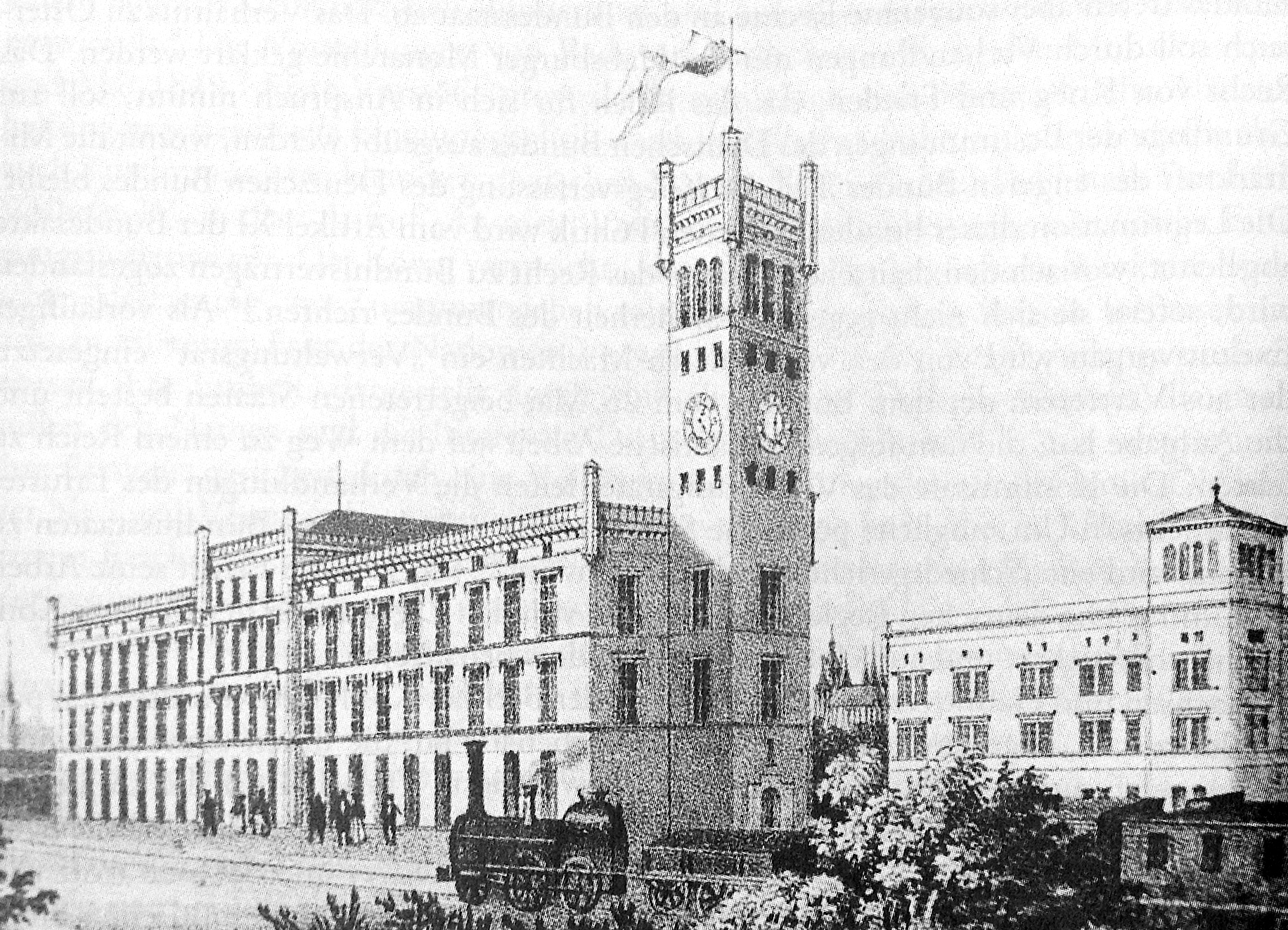 Erfurter Bahnhof, um 1850. Tagungsort Bahnhofspartei / Gothaer Partei.